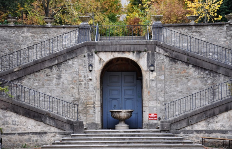 Escalier à double révolution menant au parc avec la vasque seul élément subsistant du XVIIIème siècle